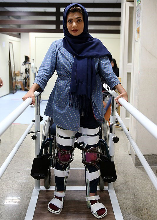 پس از طی کردن پنج عمل جراحی سنگین روی ستون فقرات، نخاع، کتف، دست چپ، ریه‌ها و دنده‌های سارا عبدالمالکی، دوره فیزیوتراپی وی در بیمارستان نور افشار سپری می‌شود.